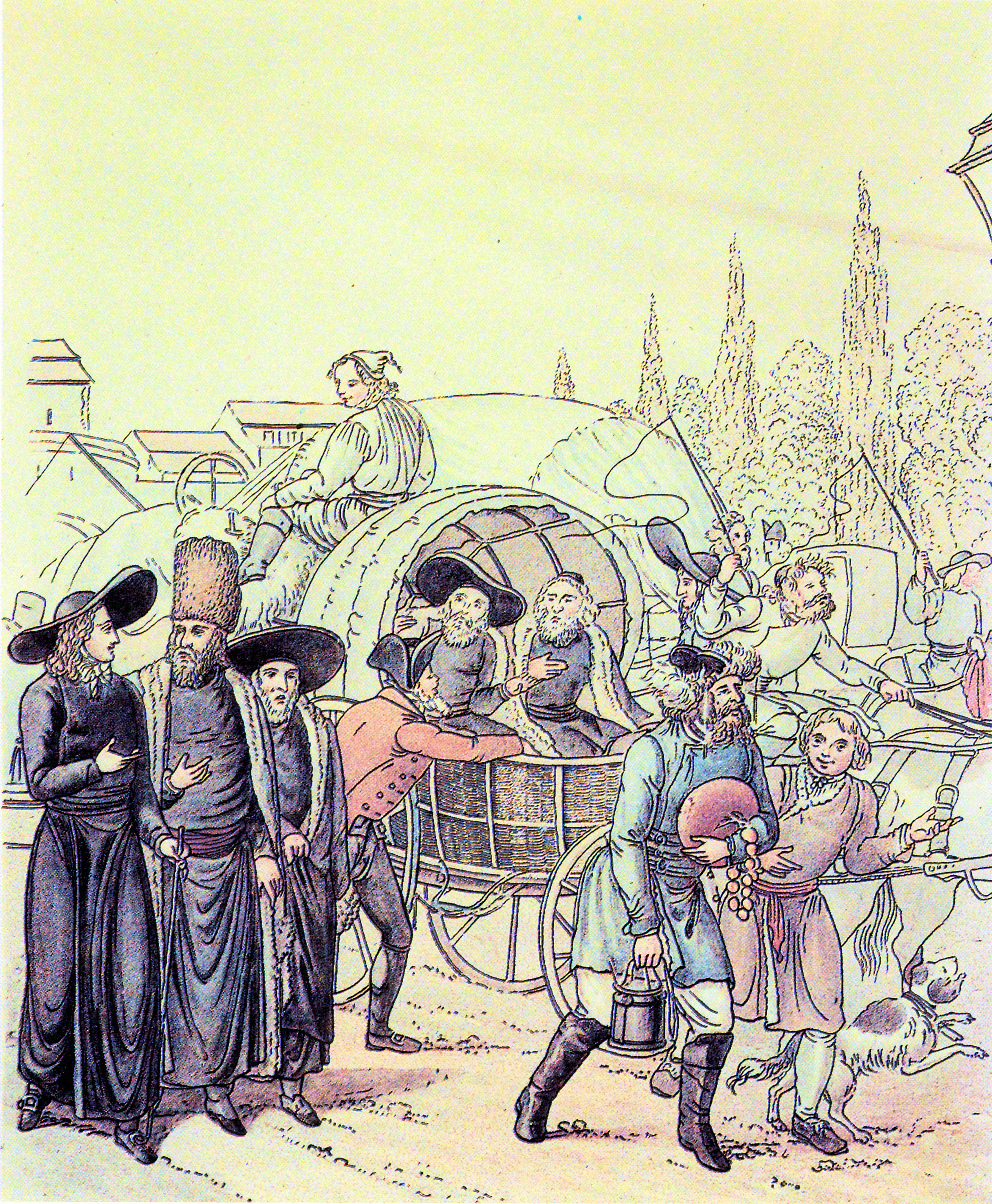 "Die Polen" Rauchwarenhändler am Brühl